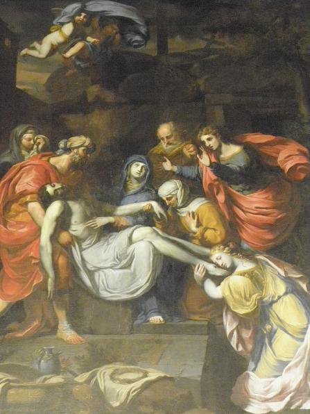 Mise au Tombeau par Frère Luc (1614-1685). Tableau de la collégiale Notre-Dame-et-Saint-Loup de Montereau-Faut-Yonne (77). Datation: 3ème quart du XVIIe. Peintre: Claude François, dit Frère Luc (1614-1685). Description: Mise au Tombeau. Classement: 10 mai 1995. Description